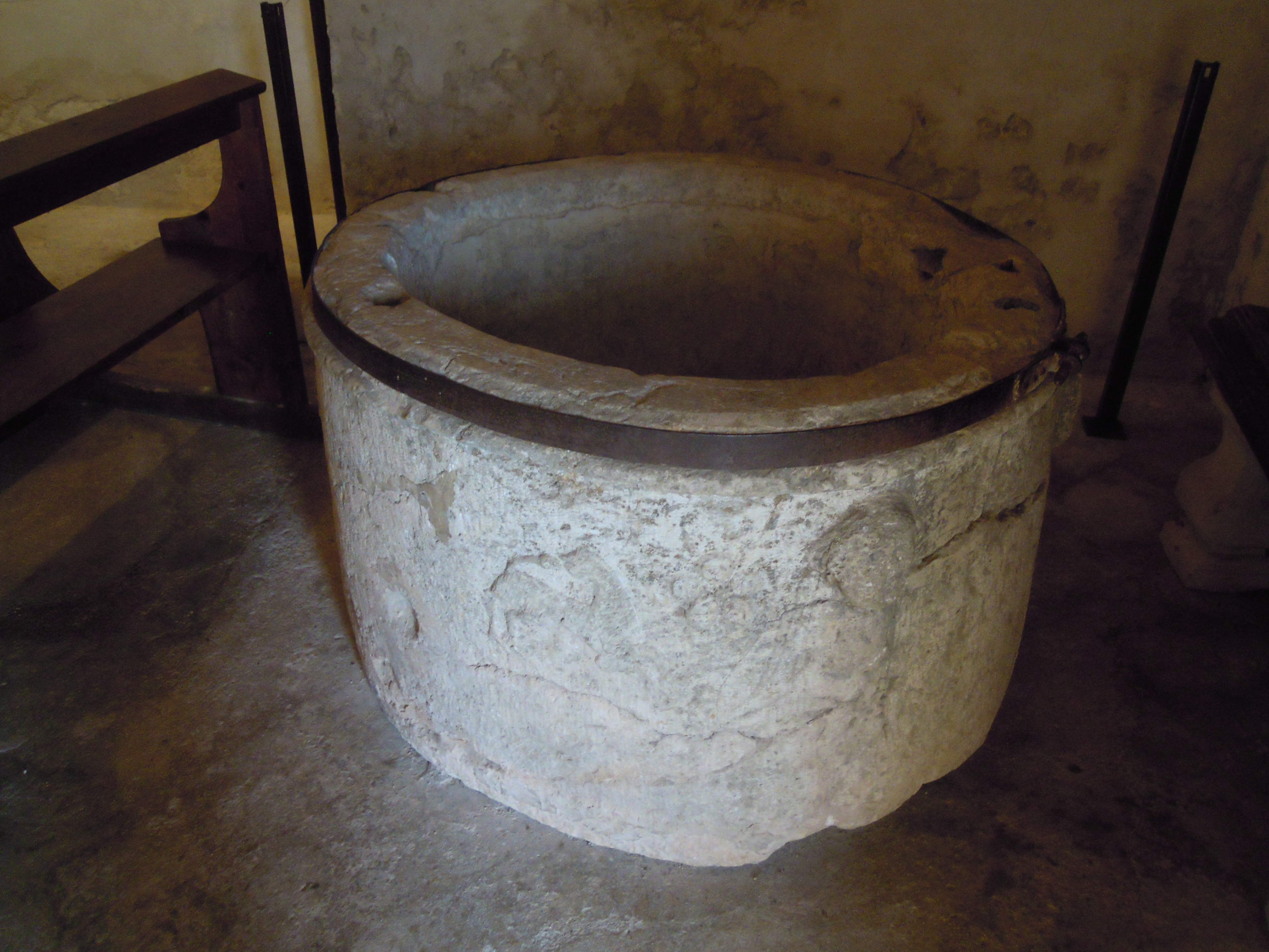 battistero